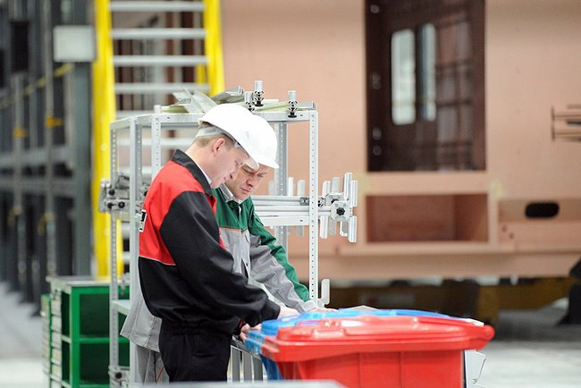 Рабочие предприятия «Уральские локомотивы».